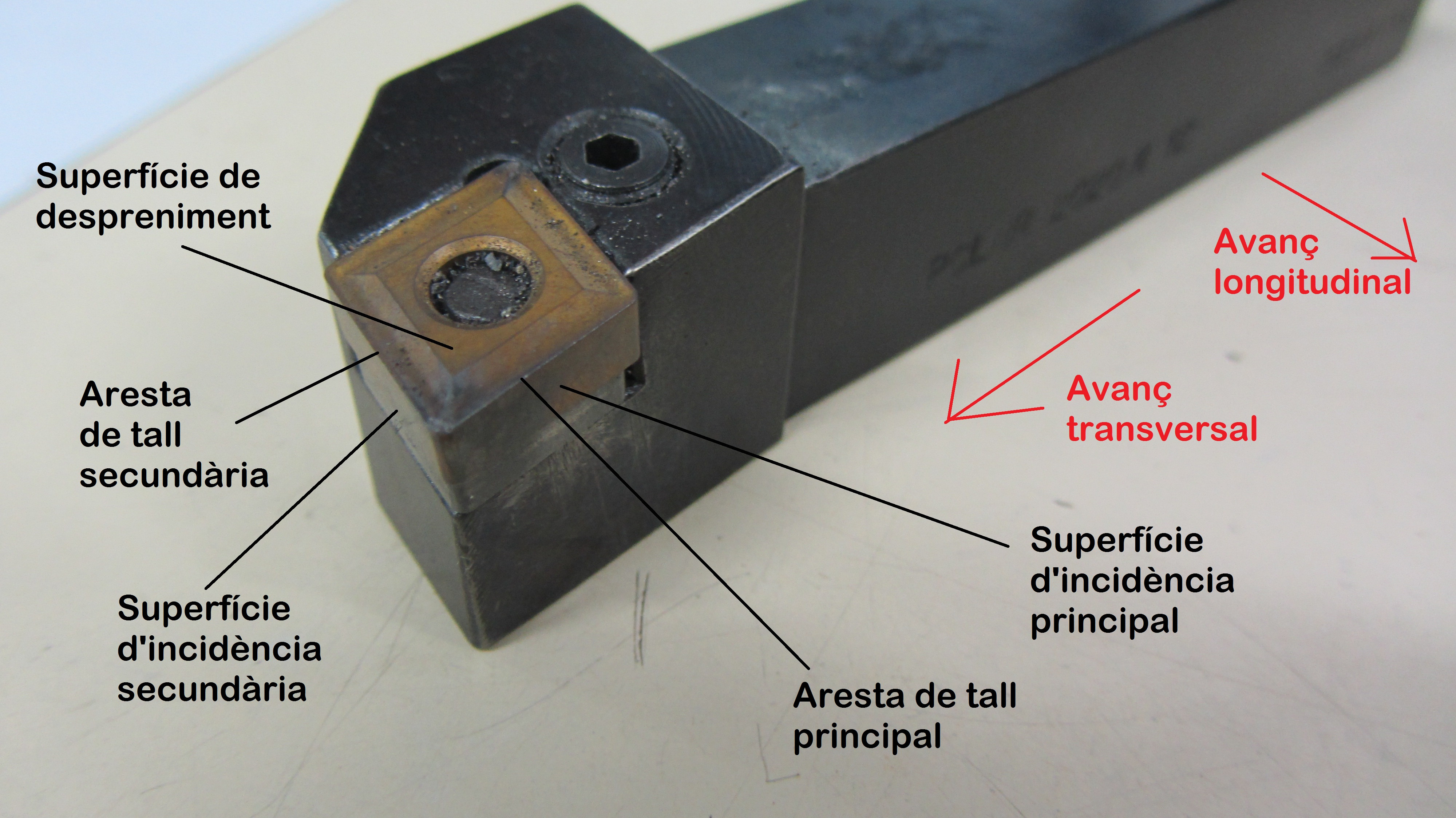 Aquesta imatge descriu les diferents cares i arestes de l'eina de tall